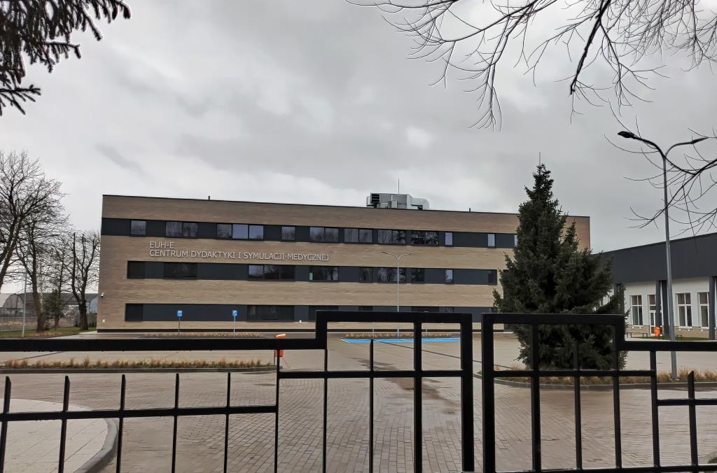 Elbląska Uczelnia Humanistyczno-Ekonomiczna w Elblągu 2020